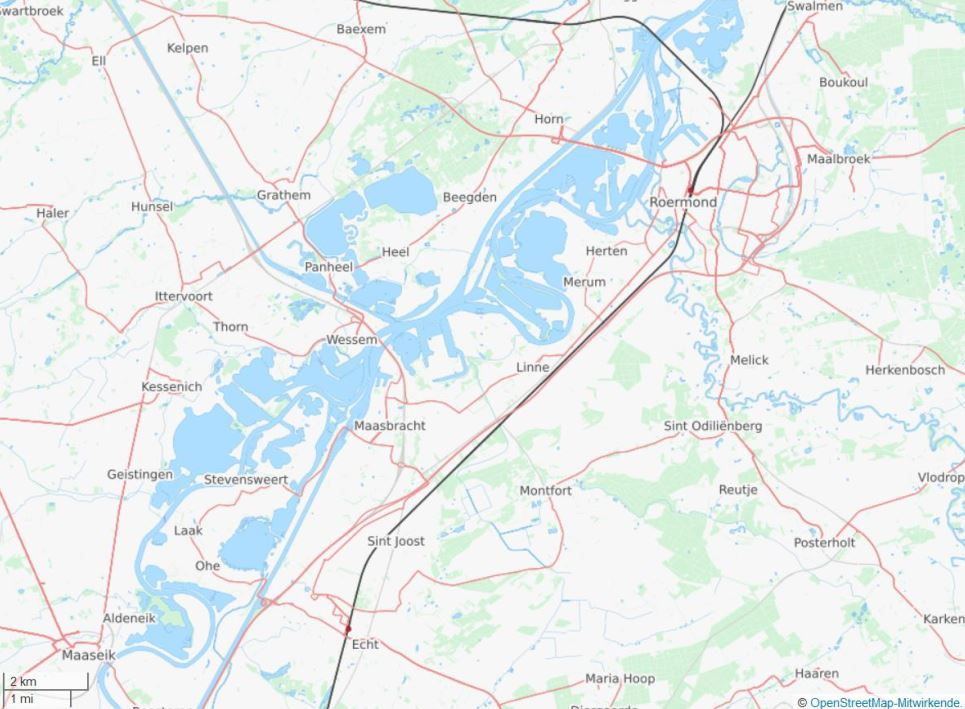 Maasplassen im Grenzbereich der belgisch Provinz Limburg und der niederländisch Provinz Limburg